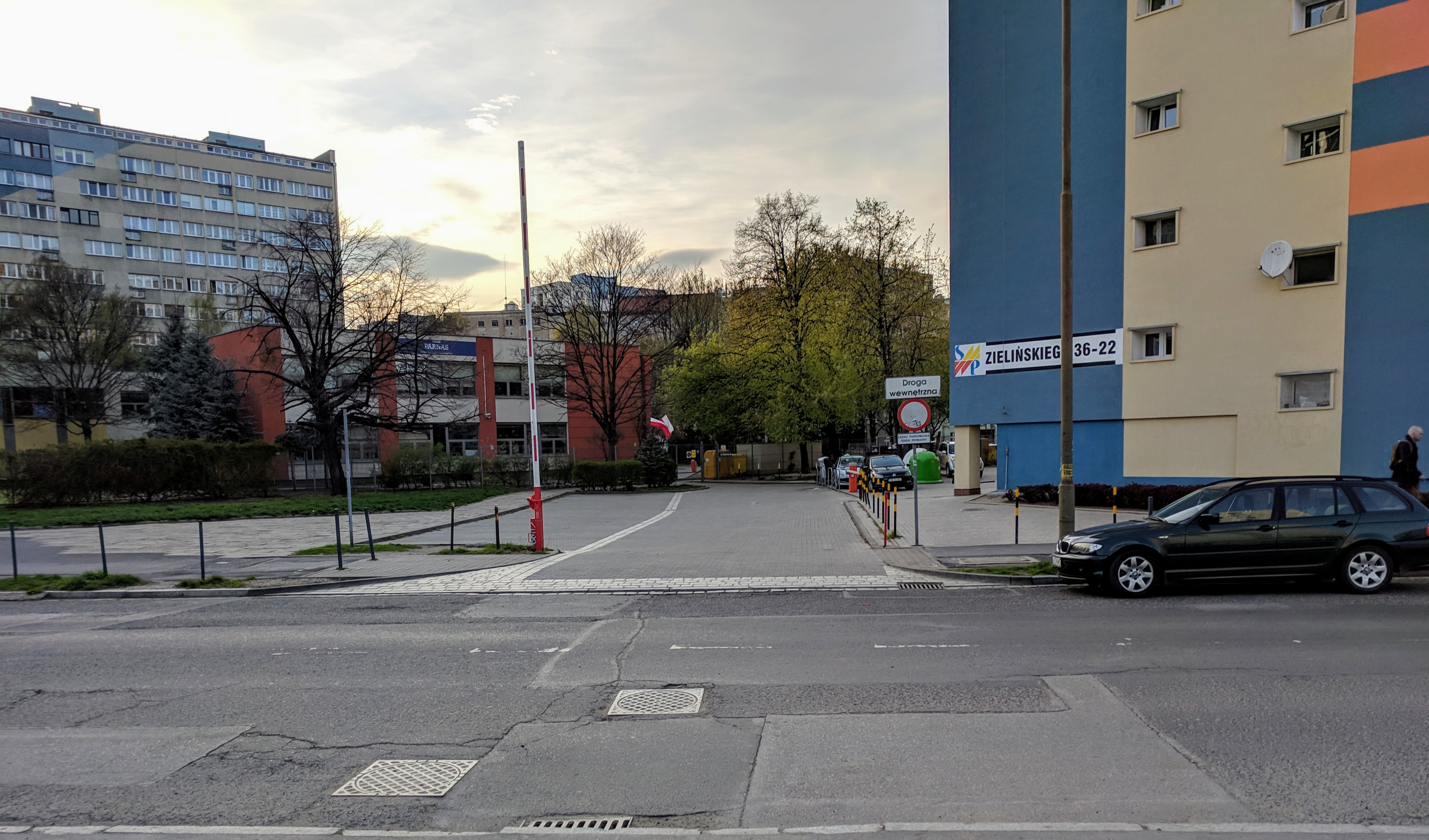 Zjazd z ulicy Gwiaździstej we Wrocławiu na parking przy prywatnym gimnazjum "Parnas" i przy bloku ul. Zielińskiego 22-36.Jest to jedyna pozostałość po zlikwidowanej ulicy Małej, która dotrwała do XXI wieku: widoczna ze skrzyżowania z ulicą Gwiaździstą (jej asfaltowa jezdnia widoczna jest na pierwszym planie w poprzek kadru) linia granitowych kostek brukowych w głąb parkingu między gimnazjum "Parnas" po lewej a narożnikiem bloku przy ul. Zielińskiego 36, wyznaczająca niegdyś linię krawężnika ulicy Małej. Widoczne w głębi za drzewami przedwojenne jeszcze kamienice to budynki przy ul. Zielińskiego 45-53.